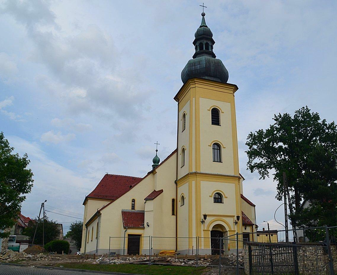 Widok kościoła z innej strony